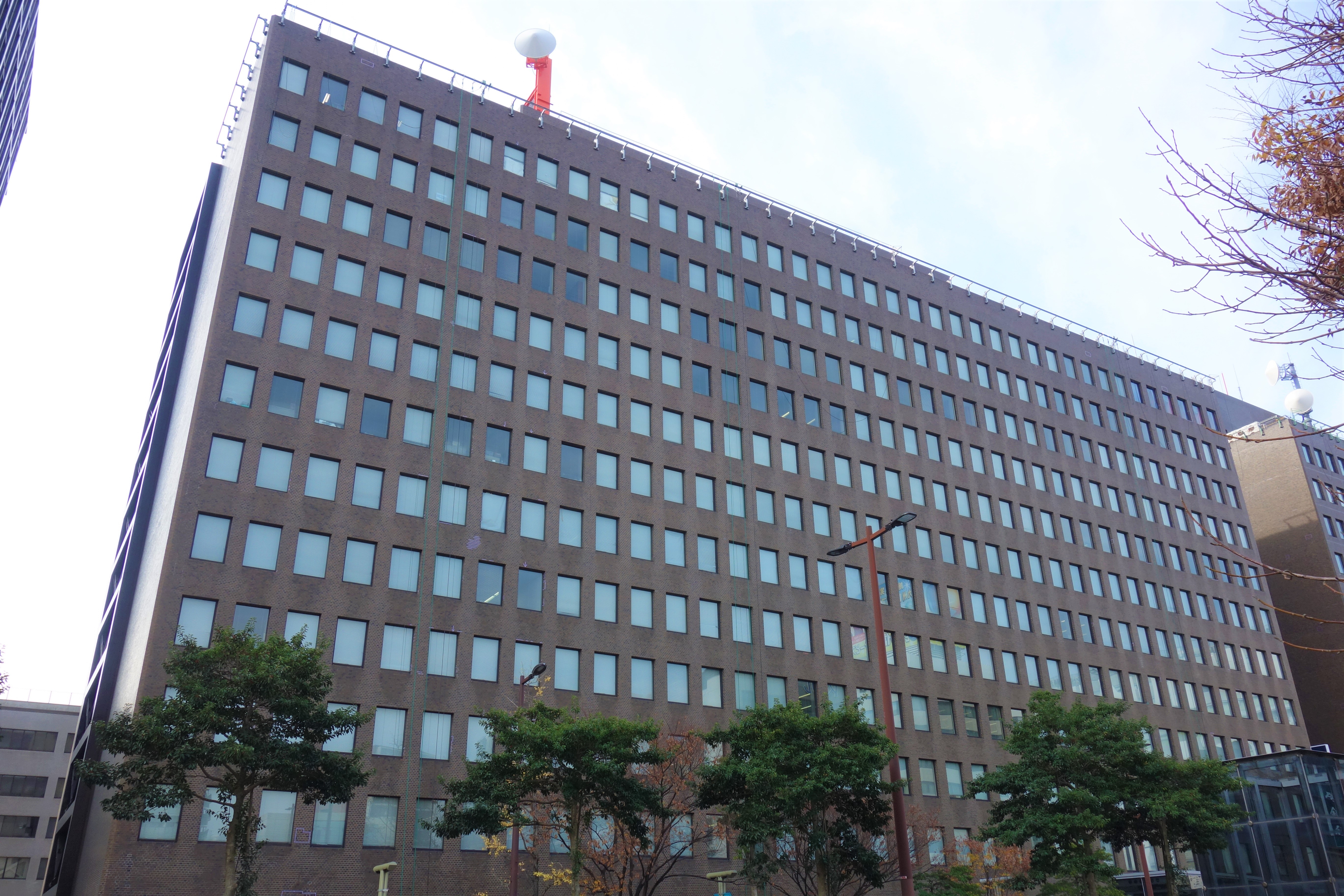 電気ビル 本館